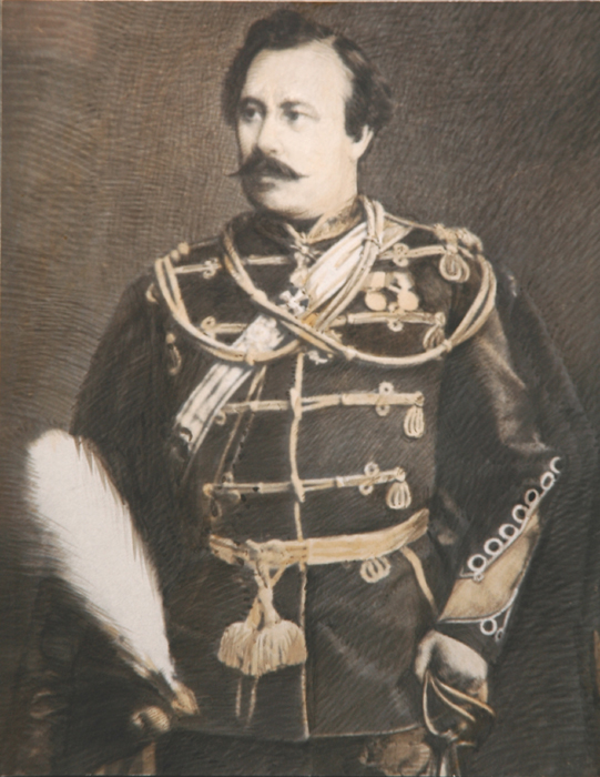 портрет П.Д. Соломирского